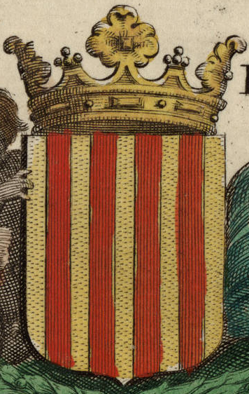 Escudo del Reino de Aragón en el mapa de Frederick de Wit, Regni Arragoniae..., 1707